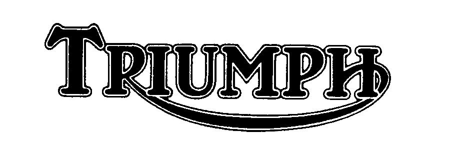 Triumph-Logo bis 1939